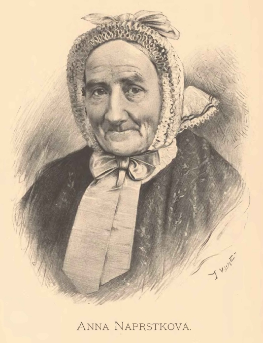 Portréty předních osobností od Jana Vilímka